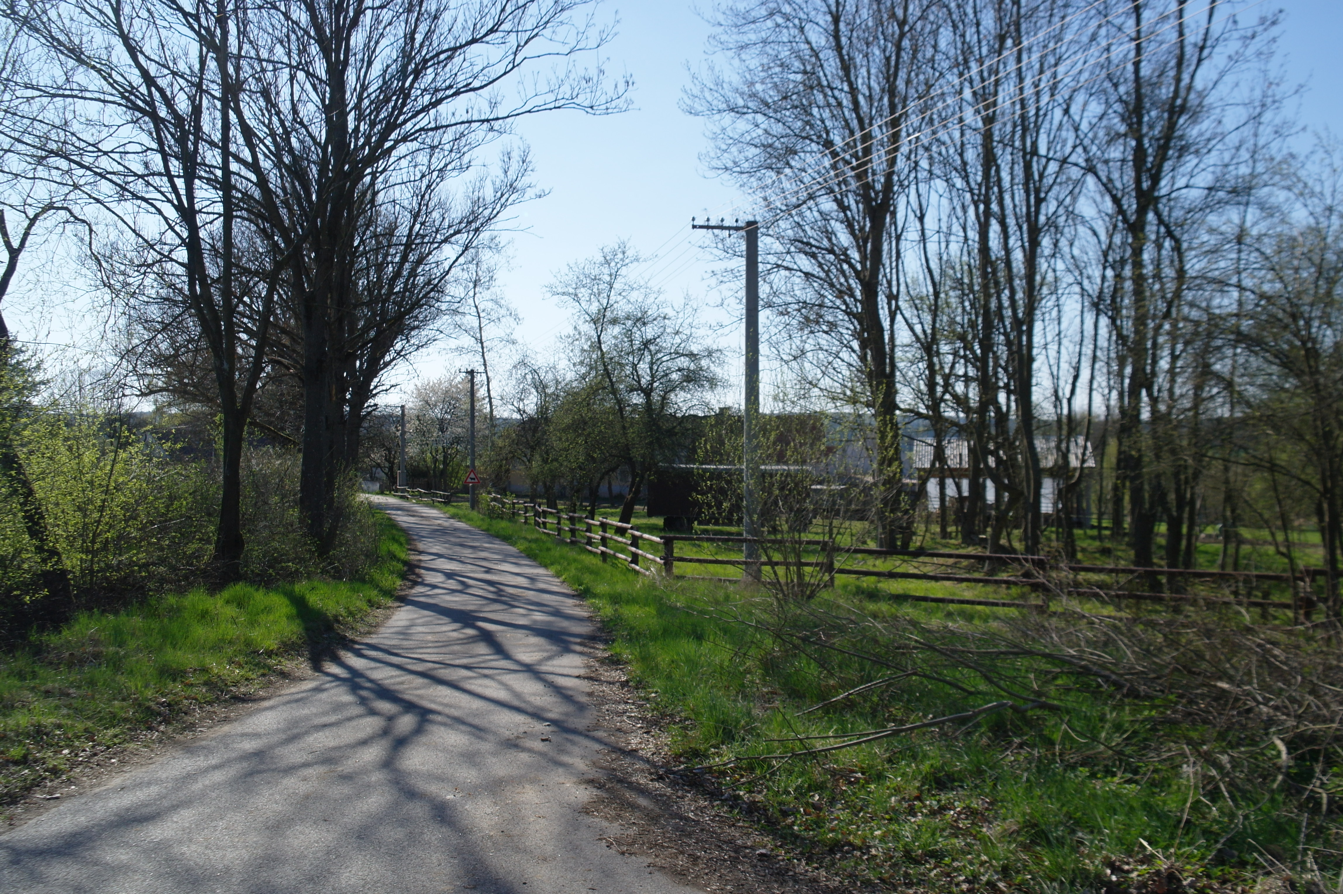 Kozín, pohled na západ směrem k domům čp. 1, 2 a 3